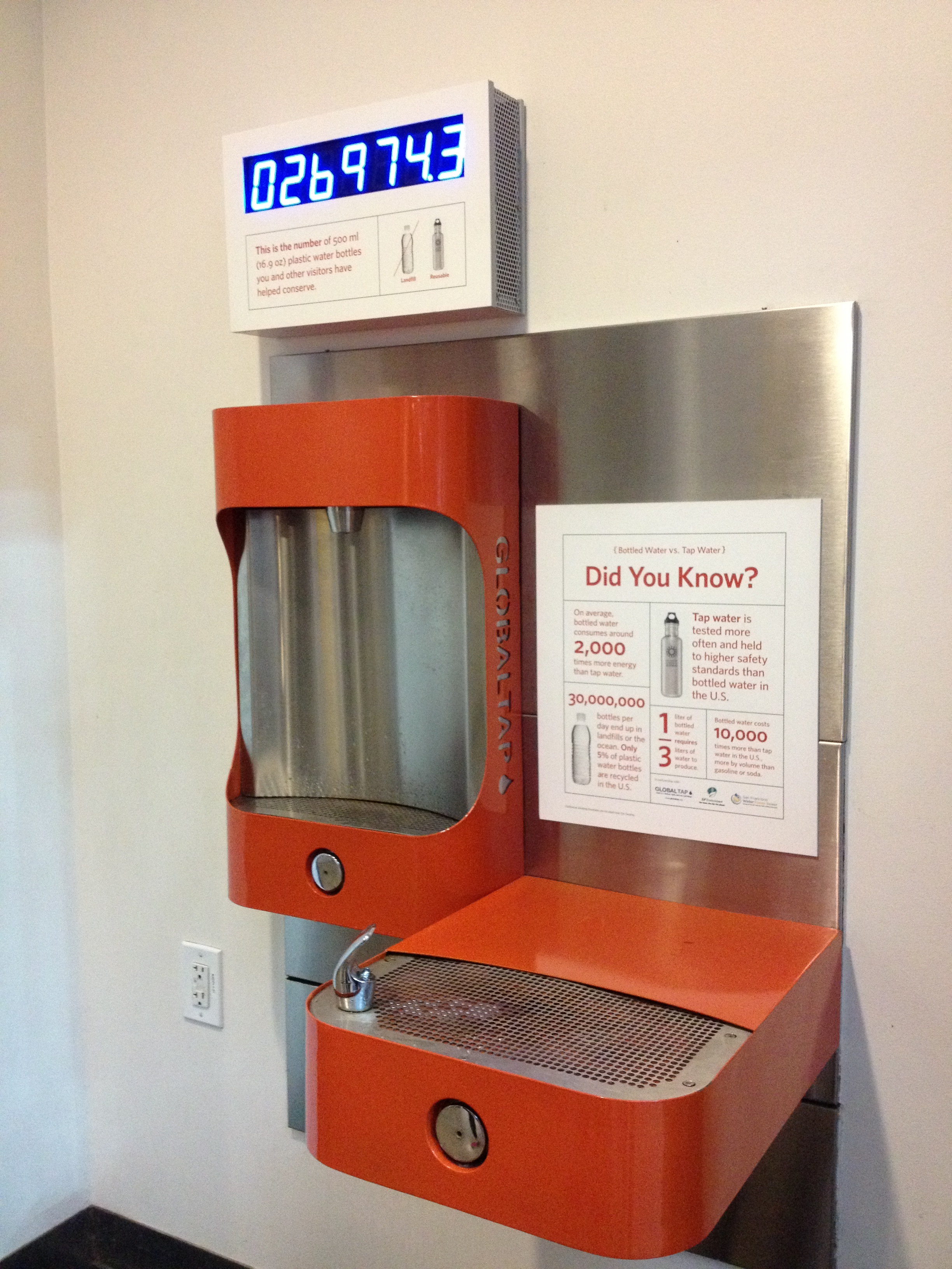 Coming soon